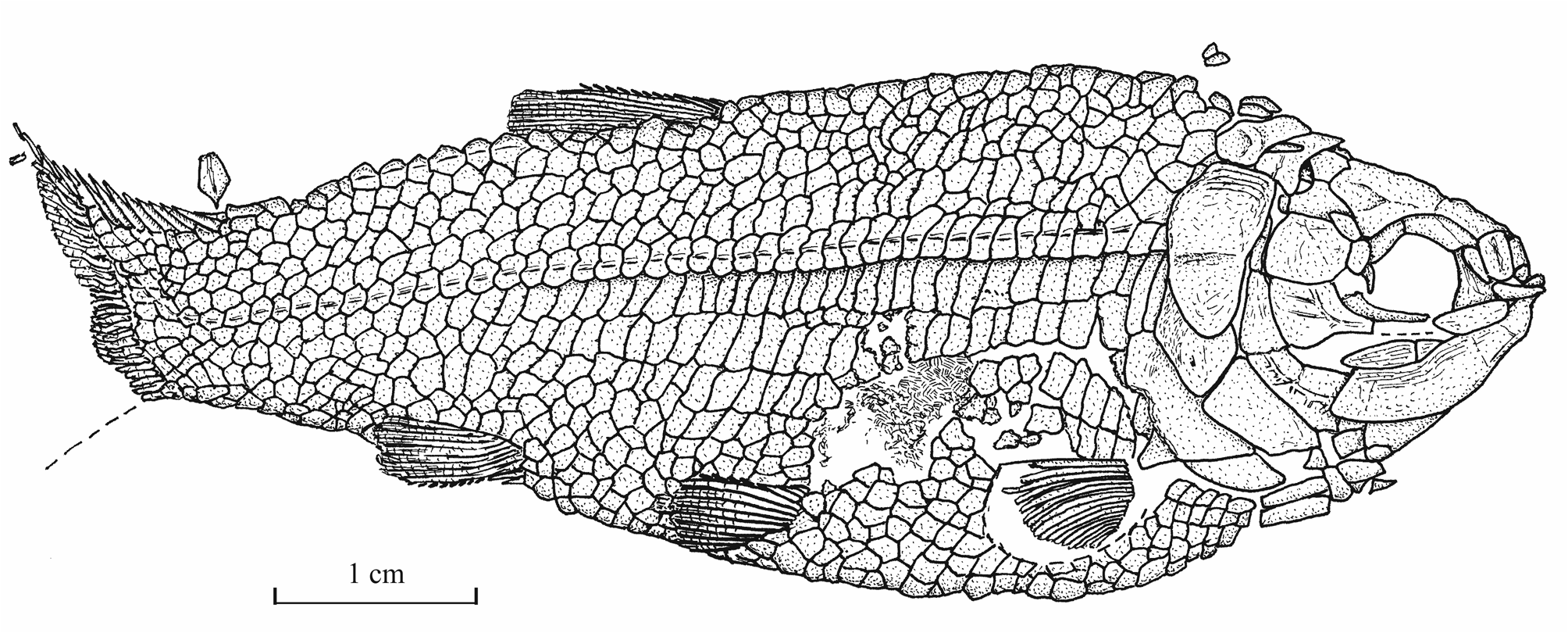 Restoration of a fossil of Luxembourgichthys friedeni